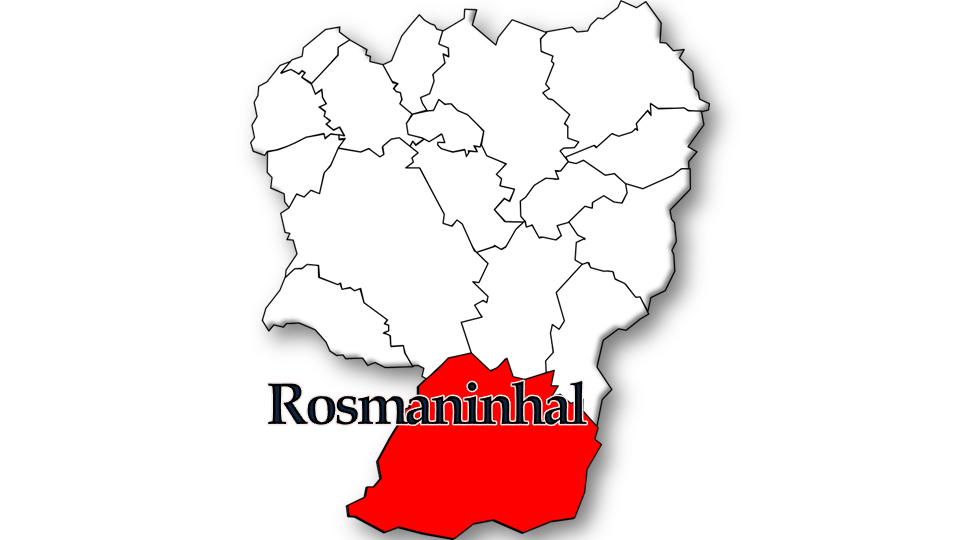 População